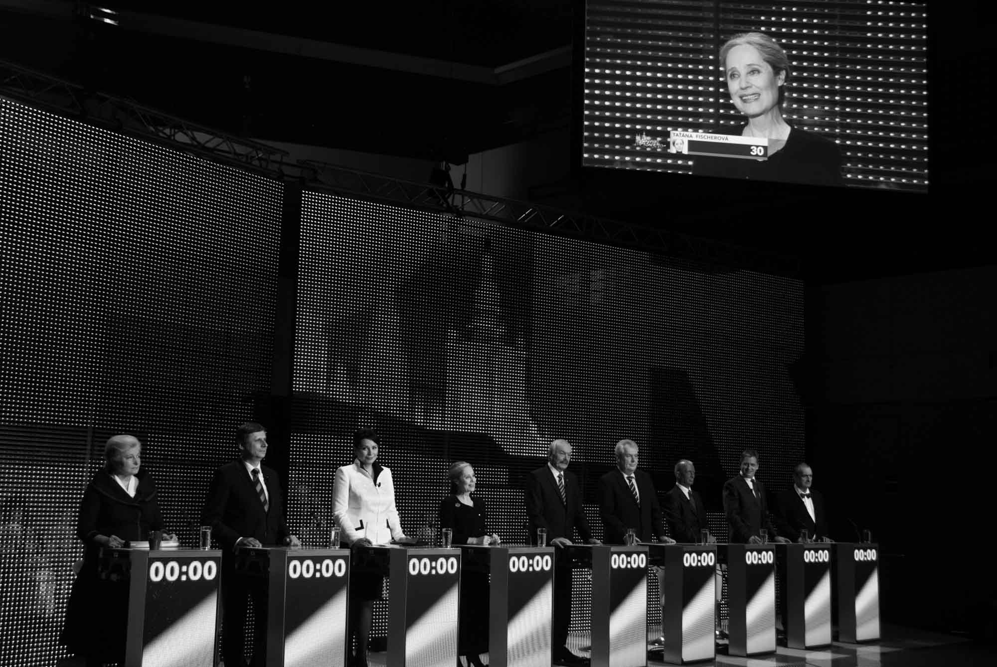 Superdebata prezidentských kandidátů na ČT